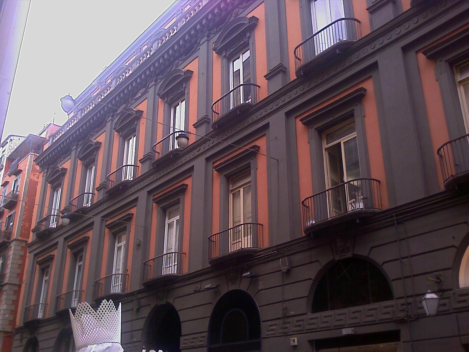 Palazzo Berio: Facade